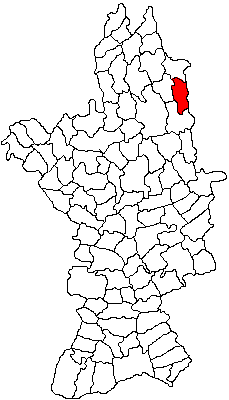 Categorie:Hărţi ale judeţului Olt